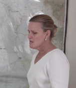 Christine Buchholz und Niema Movassat trafen sich in Juba mit Lise Grande (rechts im Bild), Koordinatorin von UN OCHA (Büro für die Koordination humanitärer Angelegenheiten der Vereinten Nationen) im Südsudan. Sie ging auf die negative Rolle der südsudanesischen Armee, der SPLA im Südsudan ein, die für diverse Menschenrechtsverletzungen verantwortlich sei. Auch werden nach ihrer Einschätzung nach der erfolgten Abspaltung diverse Stammeskonflikte um Land, Wasser und Vieh im Süden wieder aufflammen, da dann die einigende Klammer der Spaltung vom Norden wegfalle. Die humanitäre Situation stellt sich im Süden als dramatisch dar. Im Frühjahr waren 2,5 Millionen Südsudanesen nach einer Missernte von Nahrungsmittelhilfen der Vereinten Nationen abhängig, die schlechte Infrastruktur erschwert die Versorgung erheblich. Die große humanitäre Herausforderung im Südsudan wird deutlich, wenn man sich vergegenwärtigt, dass es für ein 15 jähriges Mädchen hier wahrscheinlicher ist bei der Geburt ihres Kindes zu sterben als die Schule abzuschließen. Foto: DIE LINKE